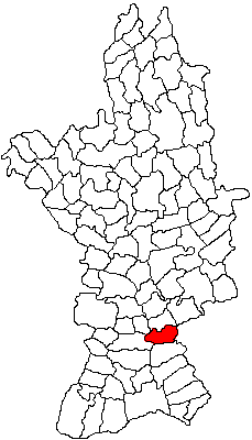 Categorie:Hărţi ale judeţului Olt